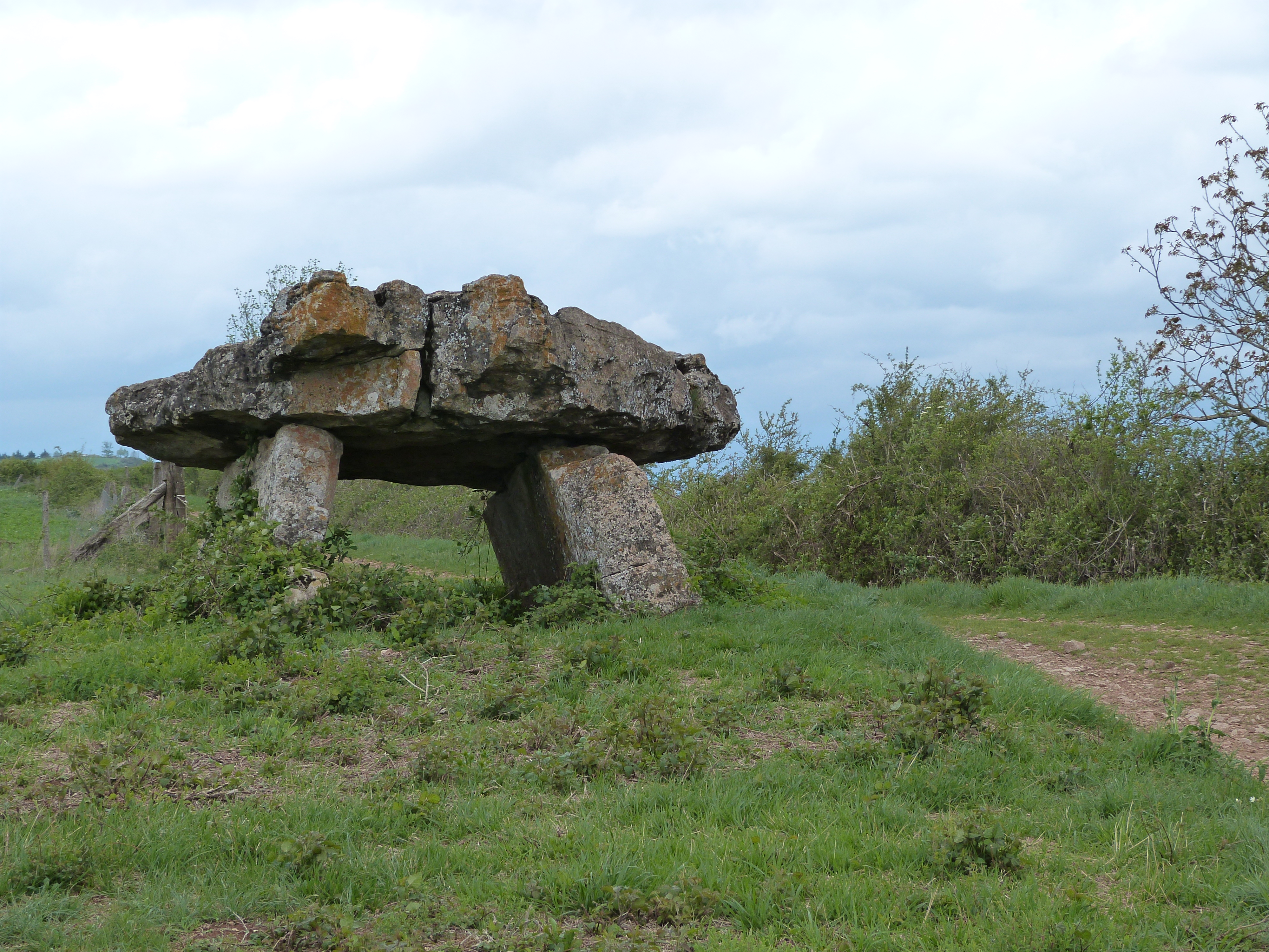 Dolmen de Pérignagol 1